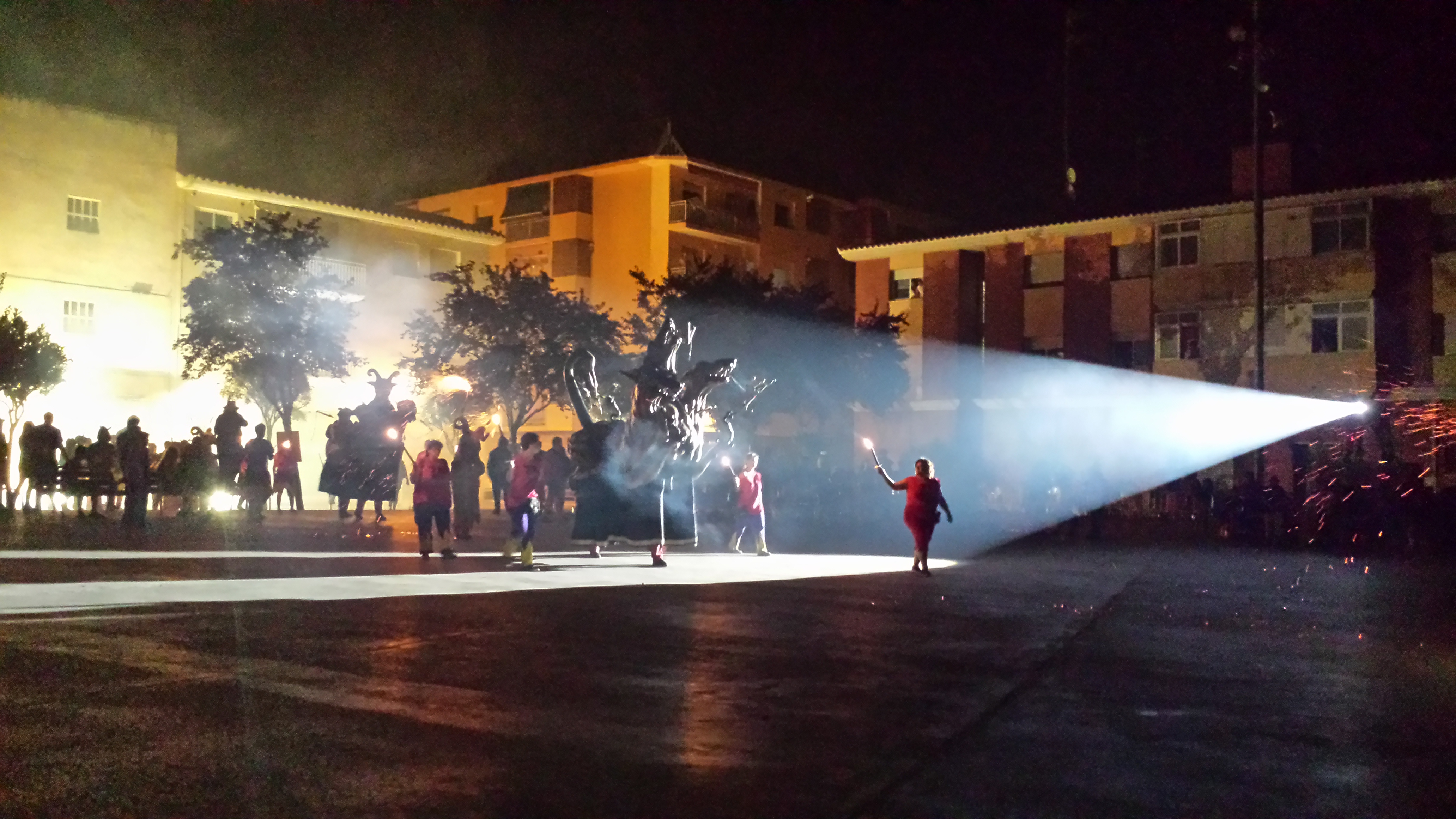 Foto realizada durante el espectáculo de fuego, realizado a cargo de los Diablos de Canovelles.